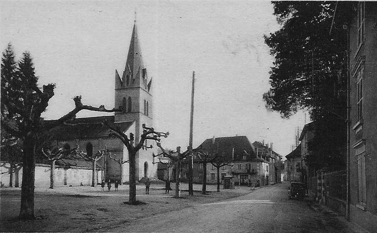 Les Éparres (Isère) : église, mairie et monument aux morts. Carte postale ancienne.